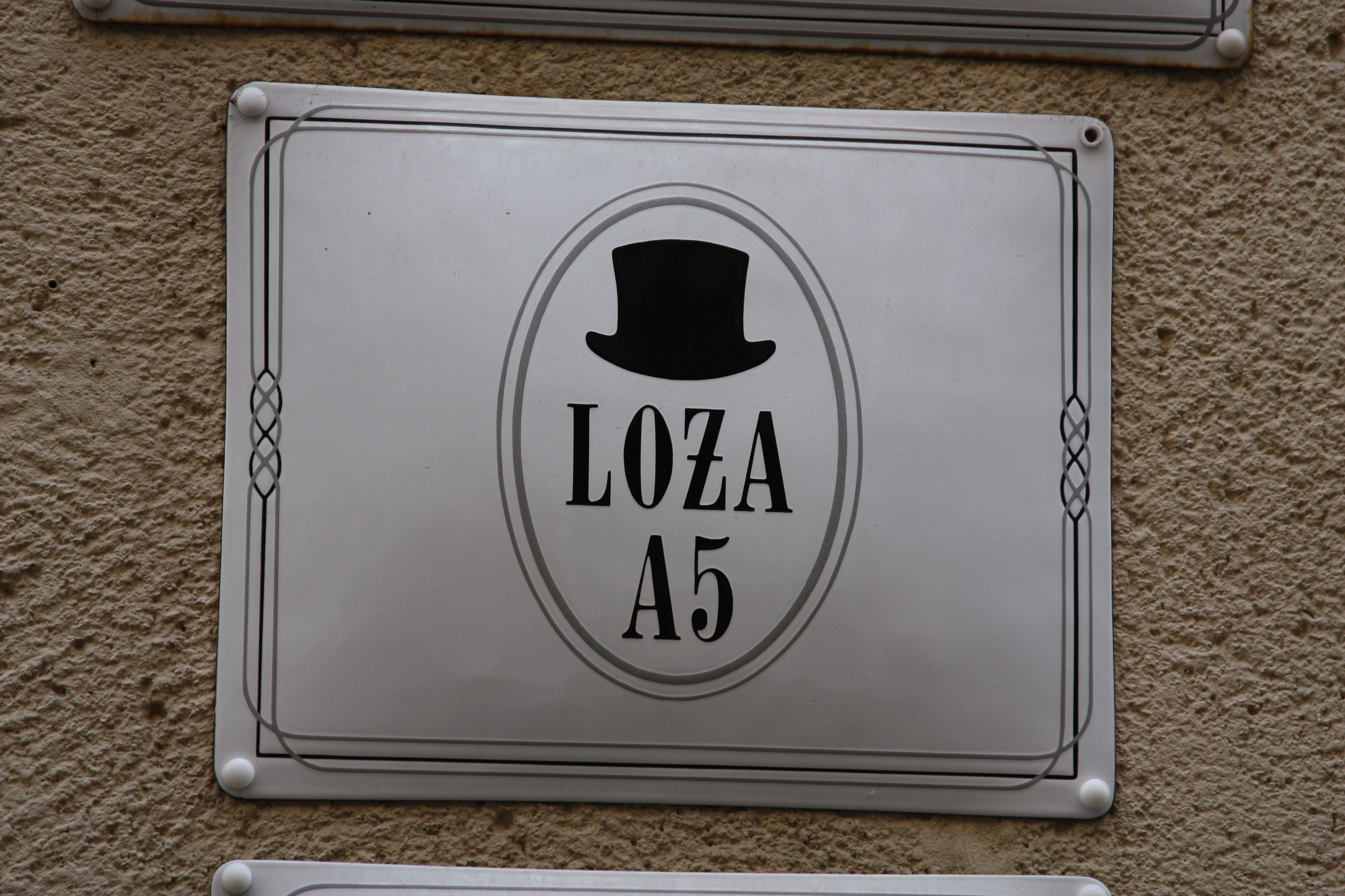 Tablica informacyjna agencji reklamowej "Loża A5" umieszczona na fasadzie kamienicy przy Długim Targu 46-47 na Głównym Mieście w Gdańsku.